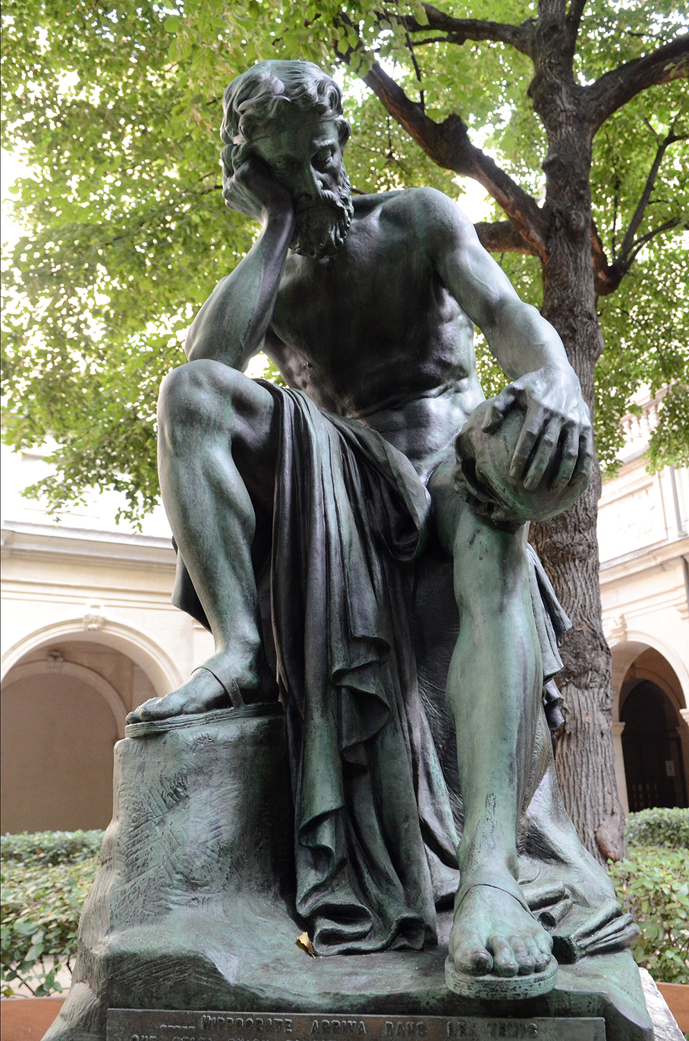 Démocrite méditant sur le siège de l'âme (1868), Léon-Alexandre Delhomme (Tournon, 1841 – Paris 1895), signé daté, fondu par Victor Thiebaut –, plâtre modèle présenté au salon de 1868, achat de la ville en 1873, marbre réalisé en 1875, actuellement au Mont-de-Marsan, dans le parc Jean Rameau.